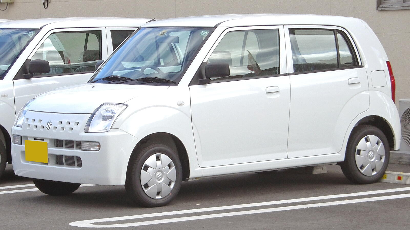 スズキ・アルト（6代目・後期型）